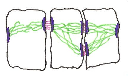 Desmosomi